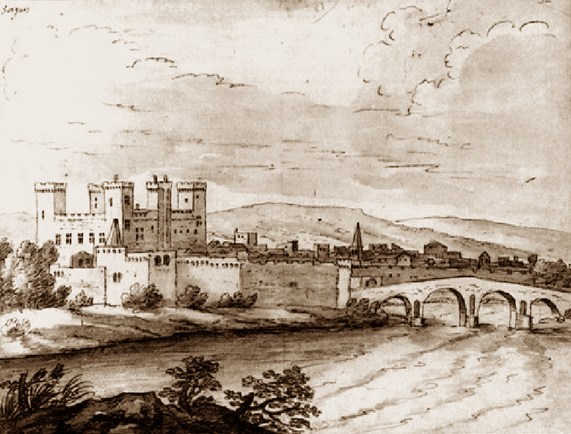 Palais des papes de Sorgues, avec le pont sur l'Ouvèze